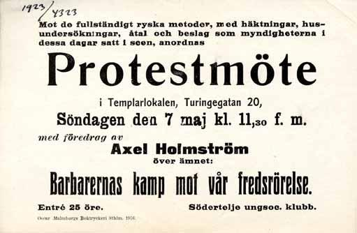 Poster: Protestmöte. Södertälje ungsocialistiska klubb